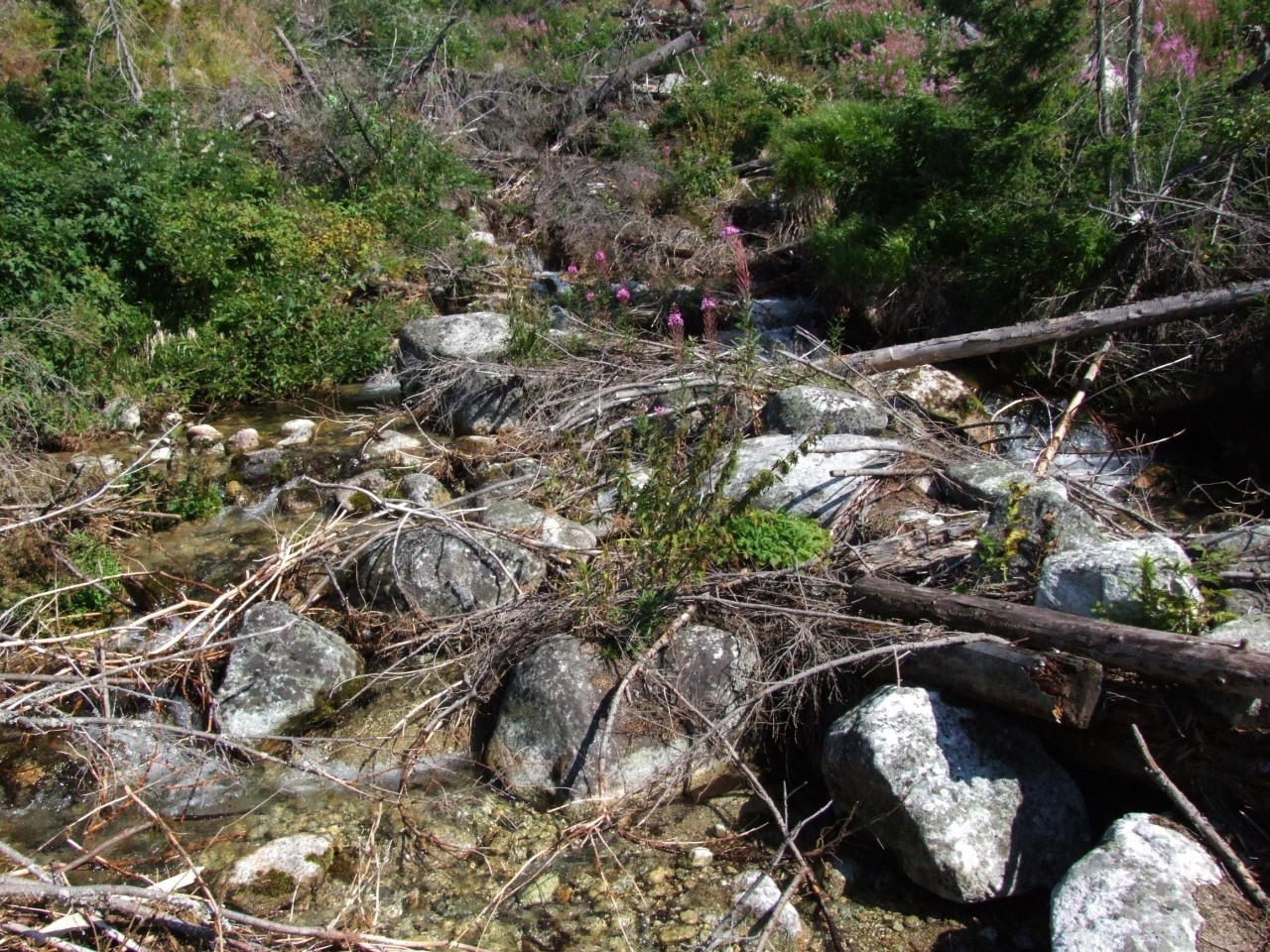 Wielki Złomiskowy Potok przy Drodze Wolności